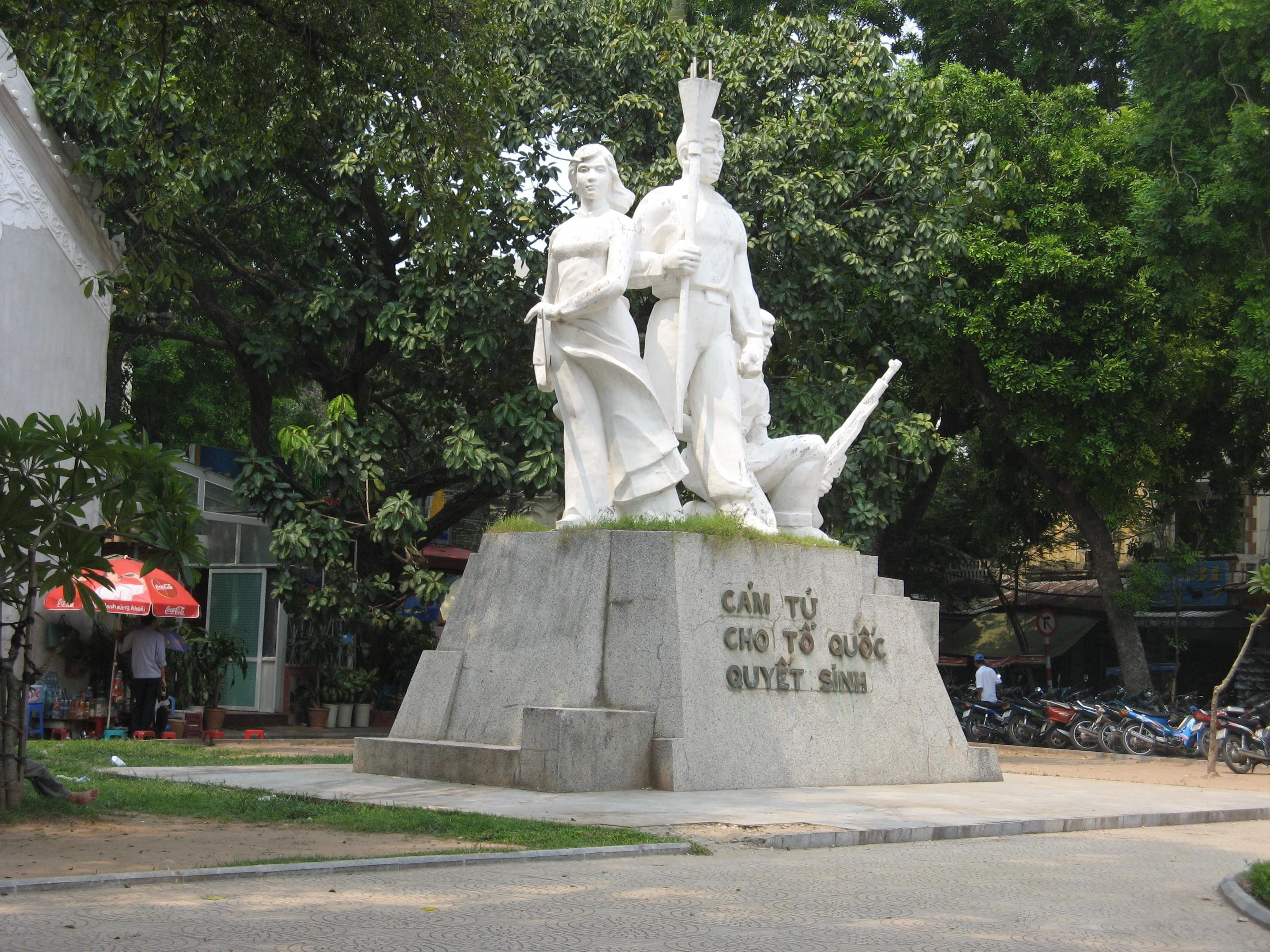 Cam Tu status at Hoan Kiem Lake